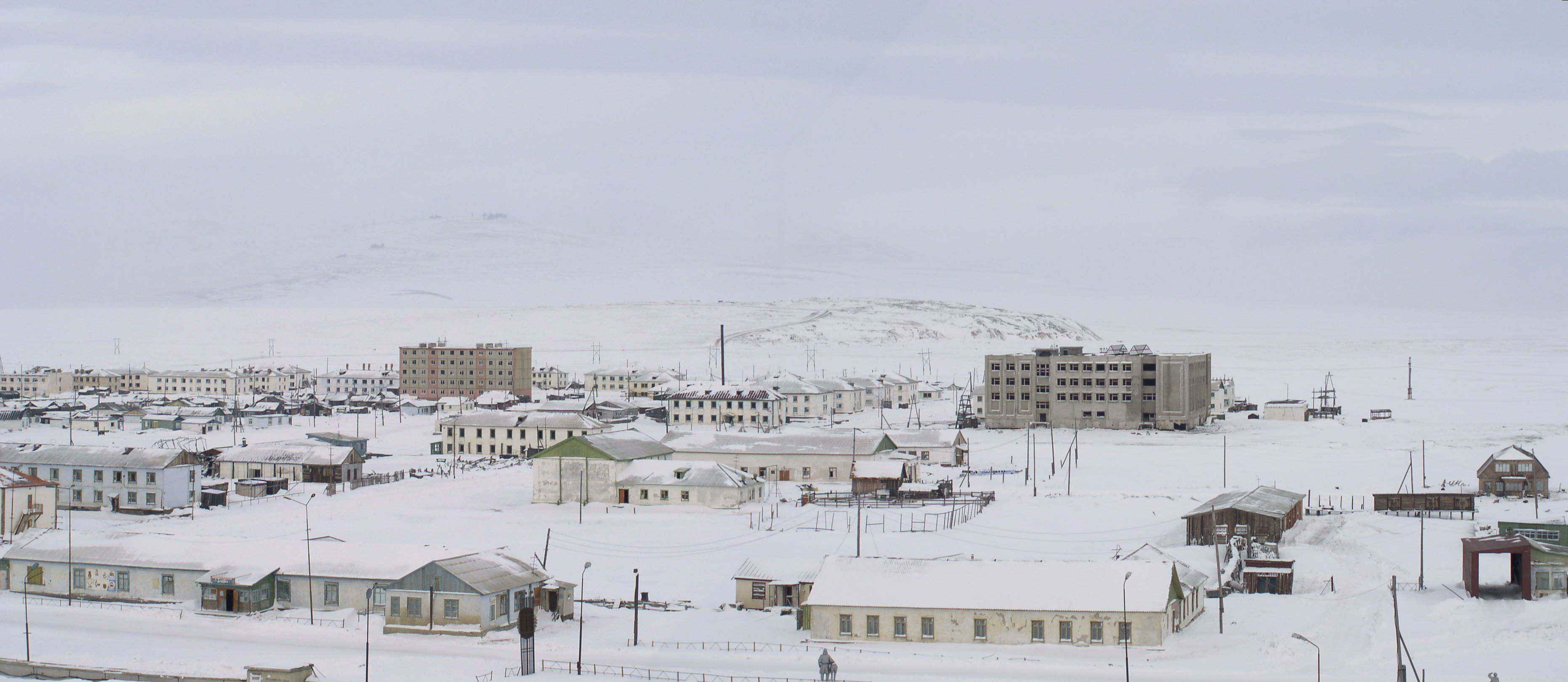 Апапельгино